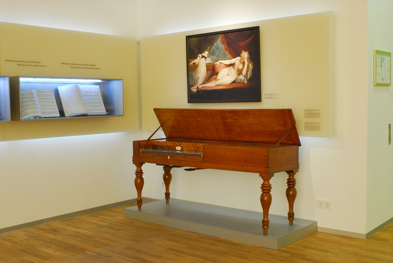 Clavecin Royal, Johann Gottlob Wagner, Dresden 1788, im Bachhaus Eisenach